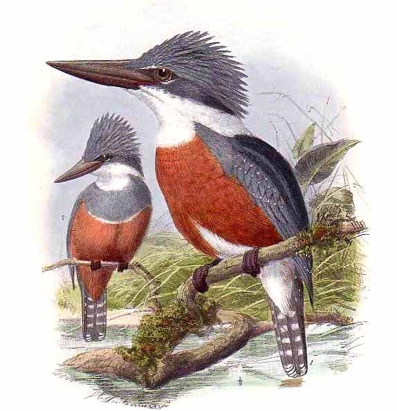 Megaceryle torquata